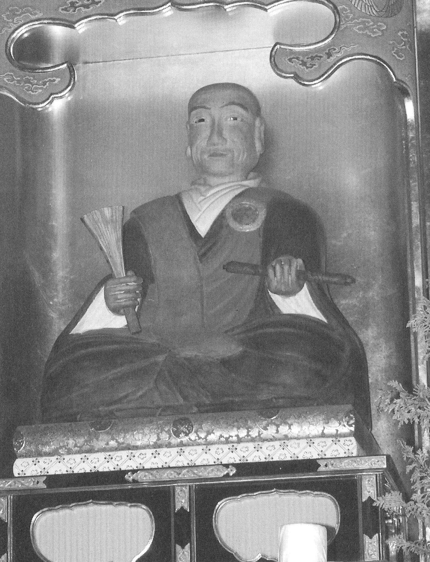 南部六郎実長像 身延山開基堂安置 身延町指定文化財